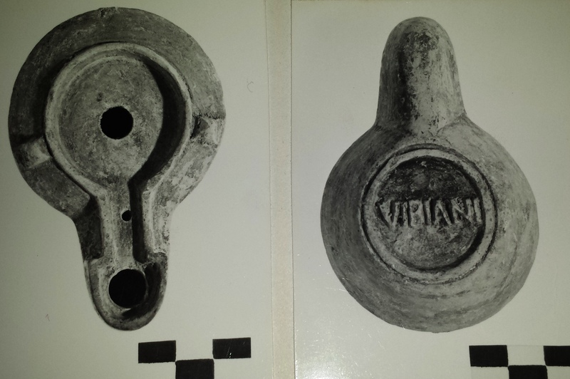 Lucerna a canale aperto con spalla appena convessa, decorata da due borchie scanalate non forate; l'infundibulo è forato al centro del disco, sfiatatoio nell'ampio canale. La base circolare piana reca al centro la marca VIBIANI a lettere rilevate entro tre incisioni concentriche. Tipo X Loeschcke